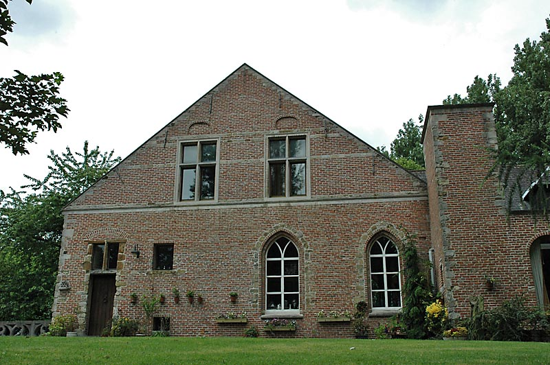 Oud klooster van Zwijveke, Oud Klooster 50, Sint-Gillis-Dendermonde